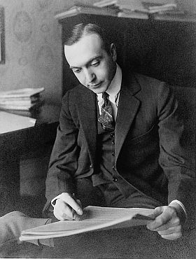 Jacobi Viktor (1883-1921) magyar zeneszerző